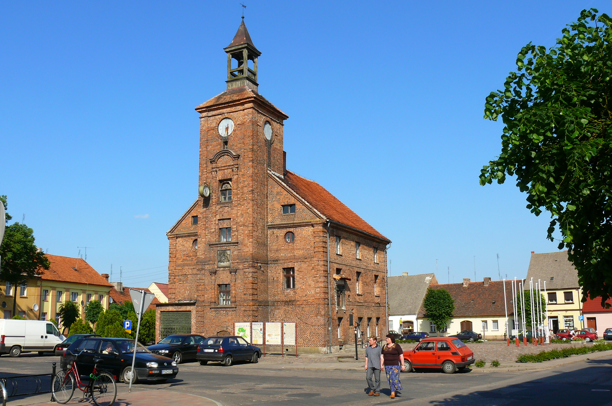 Ratusz w Obrzycku